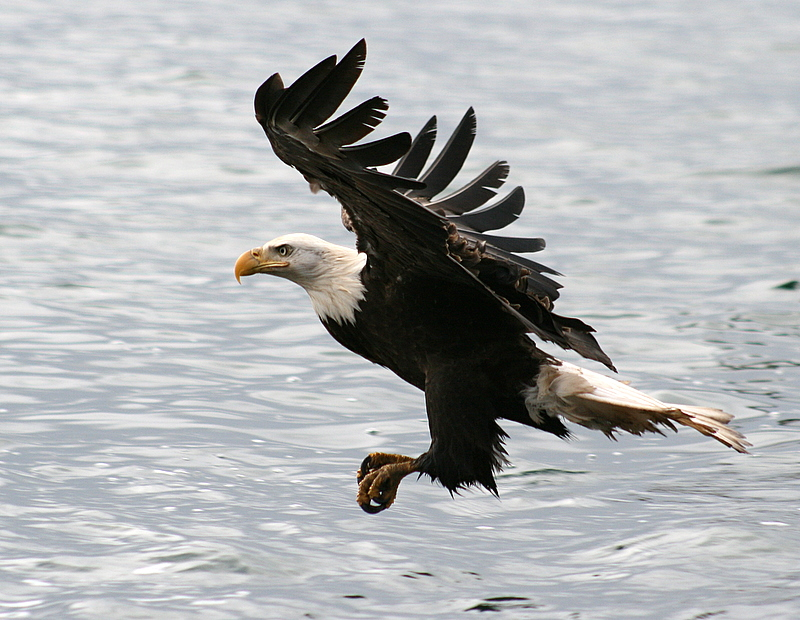 Bald Eagle Haliaeetus leucocephalus, Prince Rupert, BC, Canada